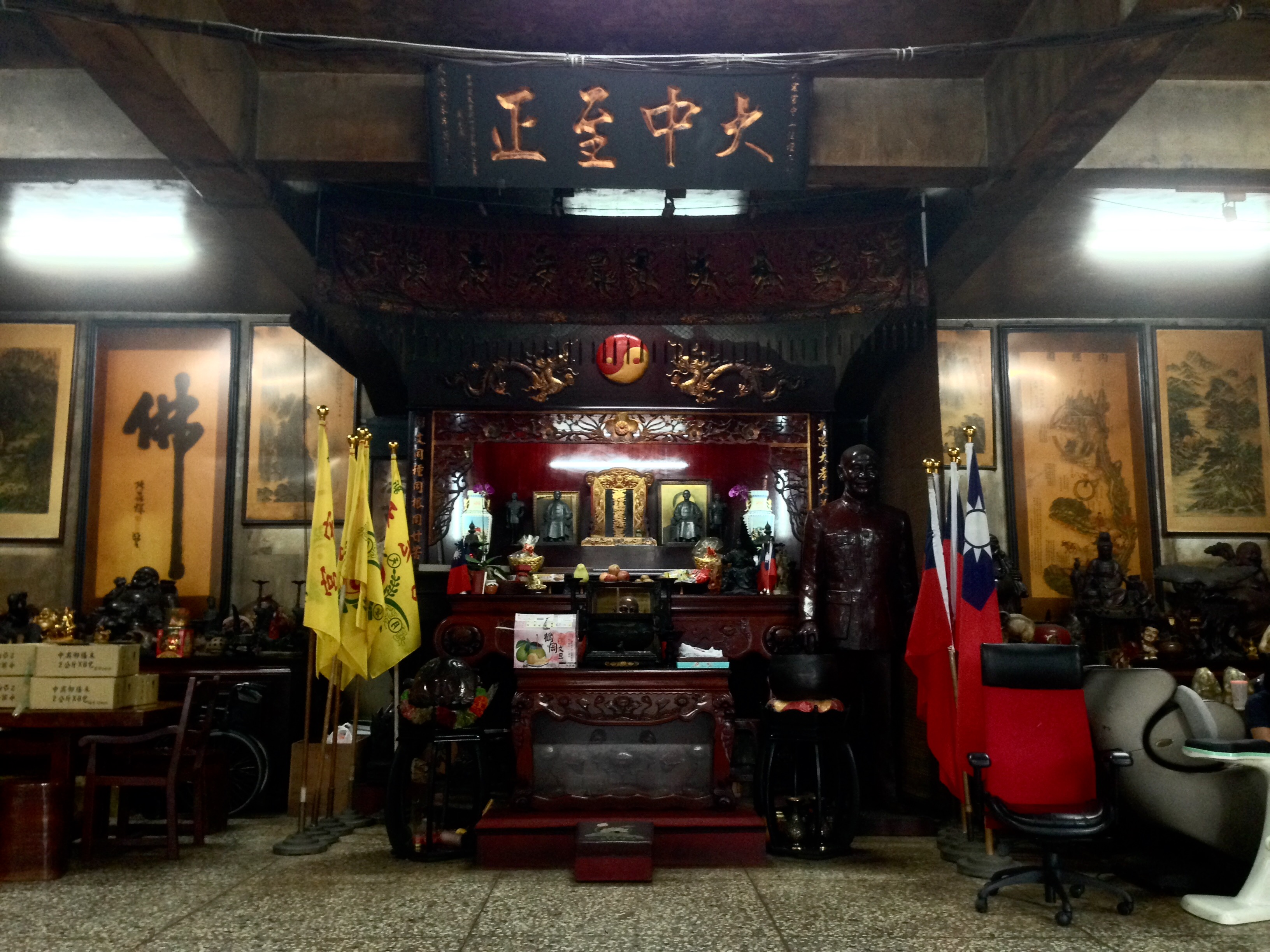 新竹市天宏宮一樓殿內